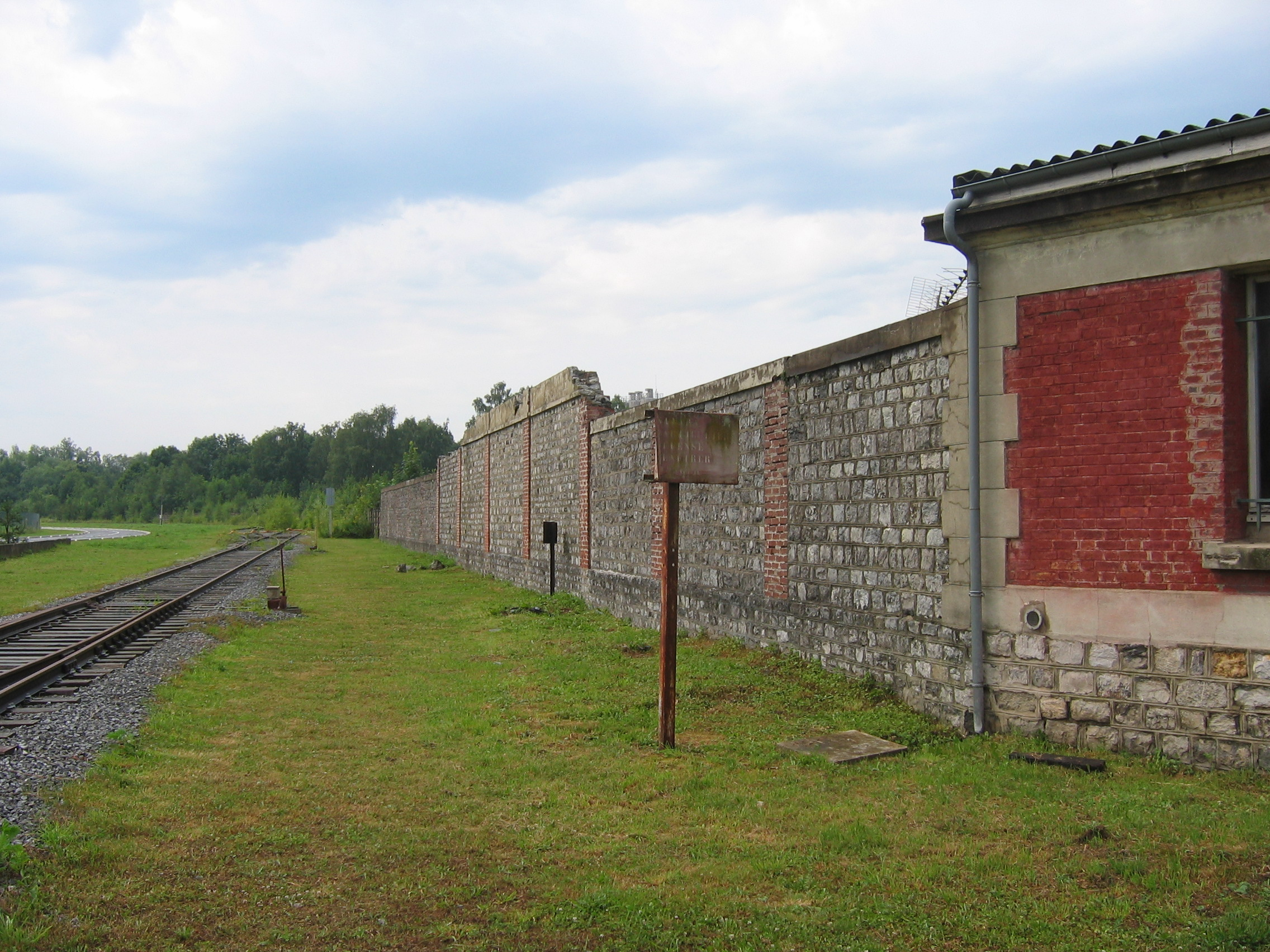 Site de Cellatex en 2012 à Givet, en Ardennes (France) 04